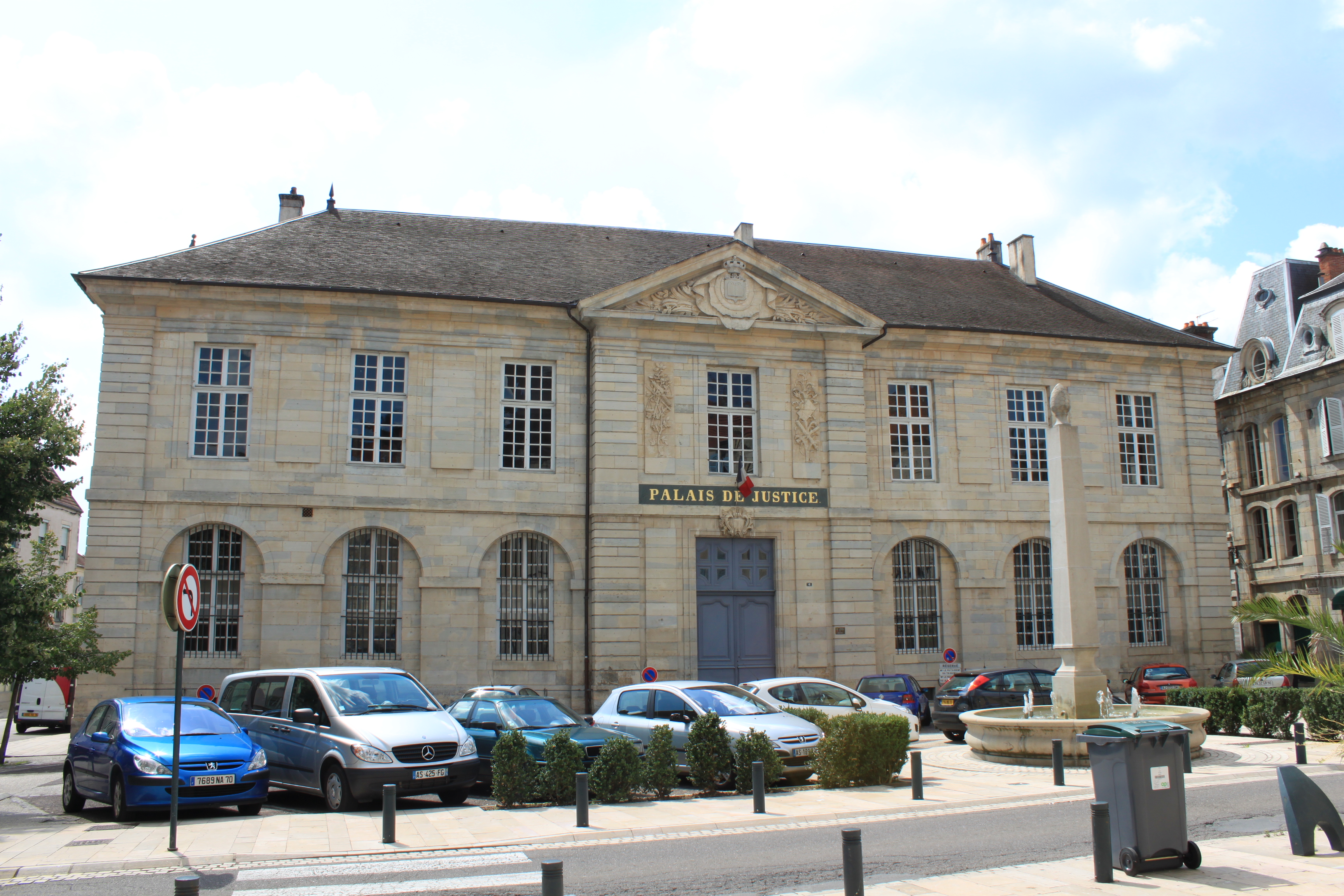 Palais de Justice, Vesoul, Haute-Saone, Franche-Comté, France